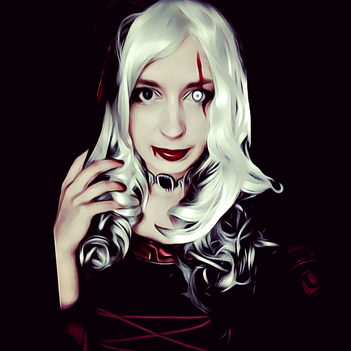 Kati Winter in einer künstlerischen Interpretationen von ihr für sie, die sie u.a. für die Postkarten an ihre Patrons verwendet.